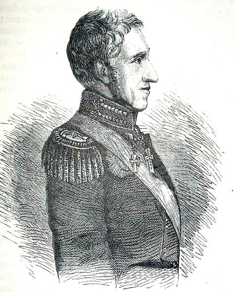 Frederik 6. of Denmark